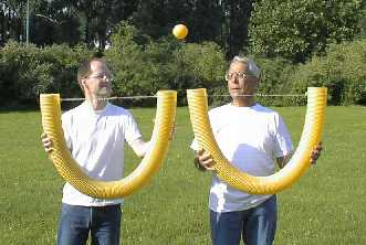 Pipejuggling